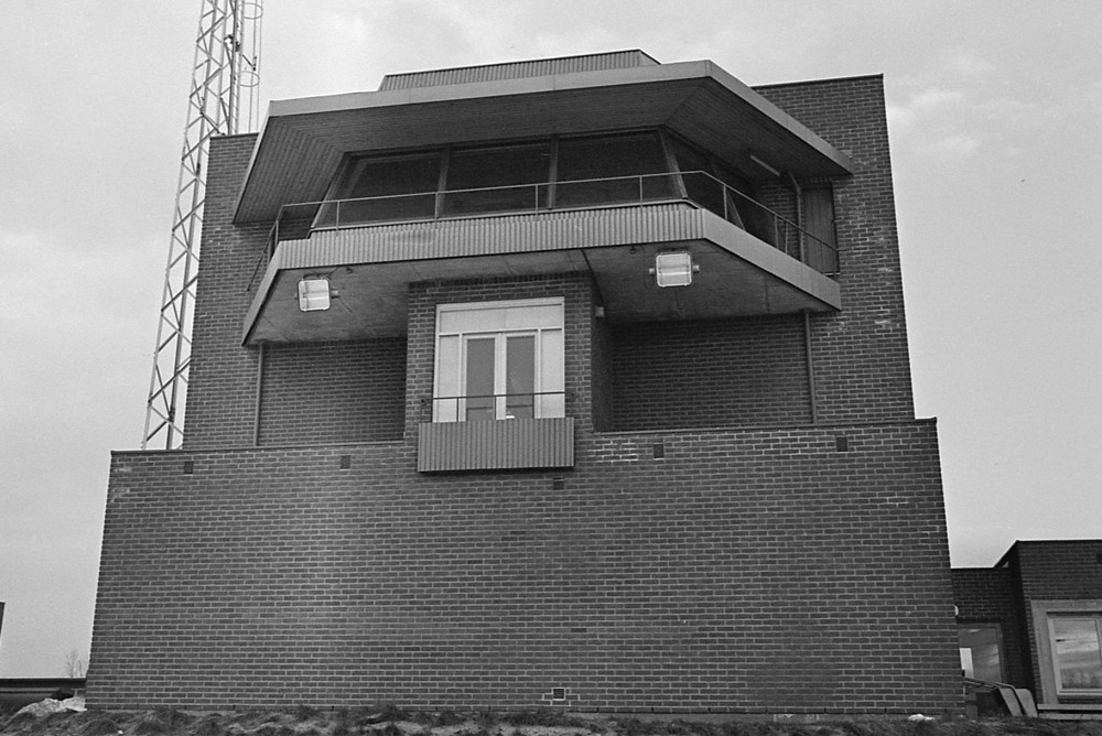 Stillverket på Alnabru skiftestasjon 25. februar 1973, tre år etter at stillverket ble tatt i bruk.